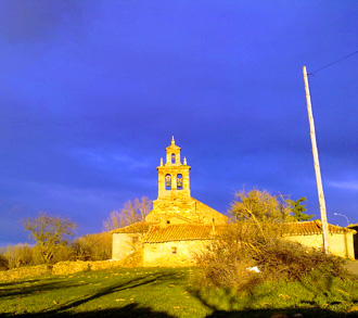 Iglesia de Villalís de la Valduerna (León)